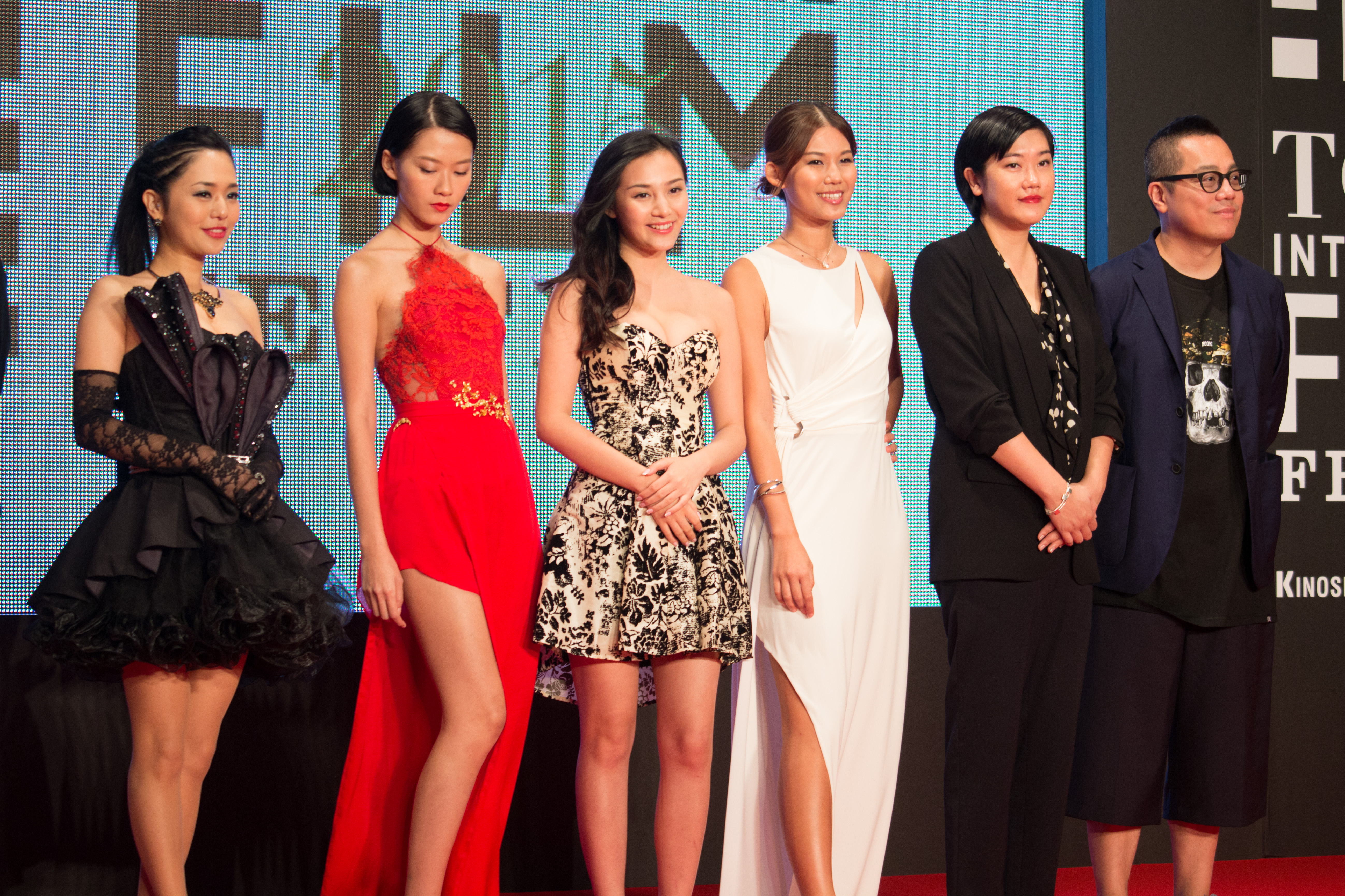 第28回 東京国際映画祭 オープニングセレモニー キャスト クルー (レイジー・ヘイジー・クレイジー)